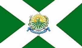 Bandeira do Município de Campos de Júlio - MT